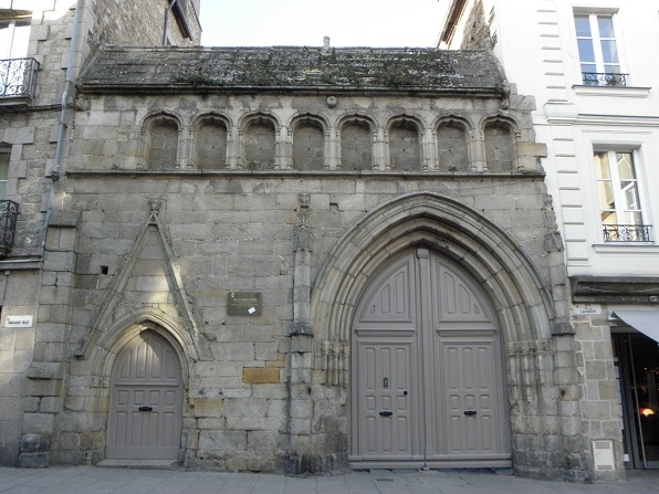 Portail du couvent des Cordeliers à Dinan (22).